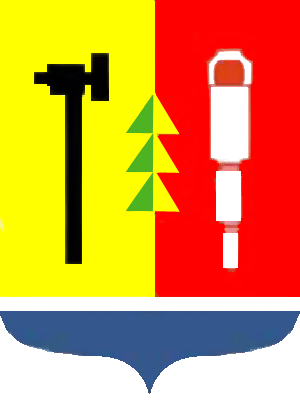 Старый герб города Сучан (Партизанск) Приморский край (1971 г.)